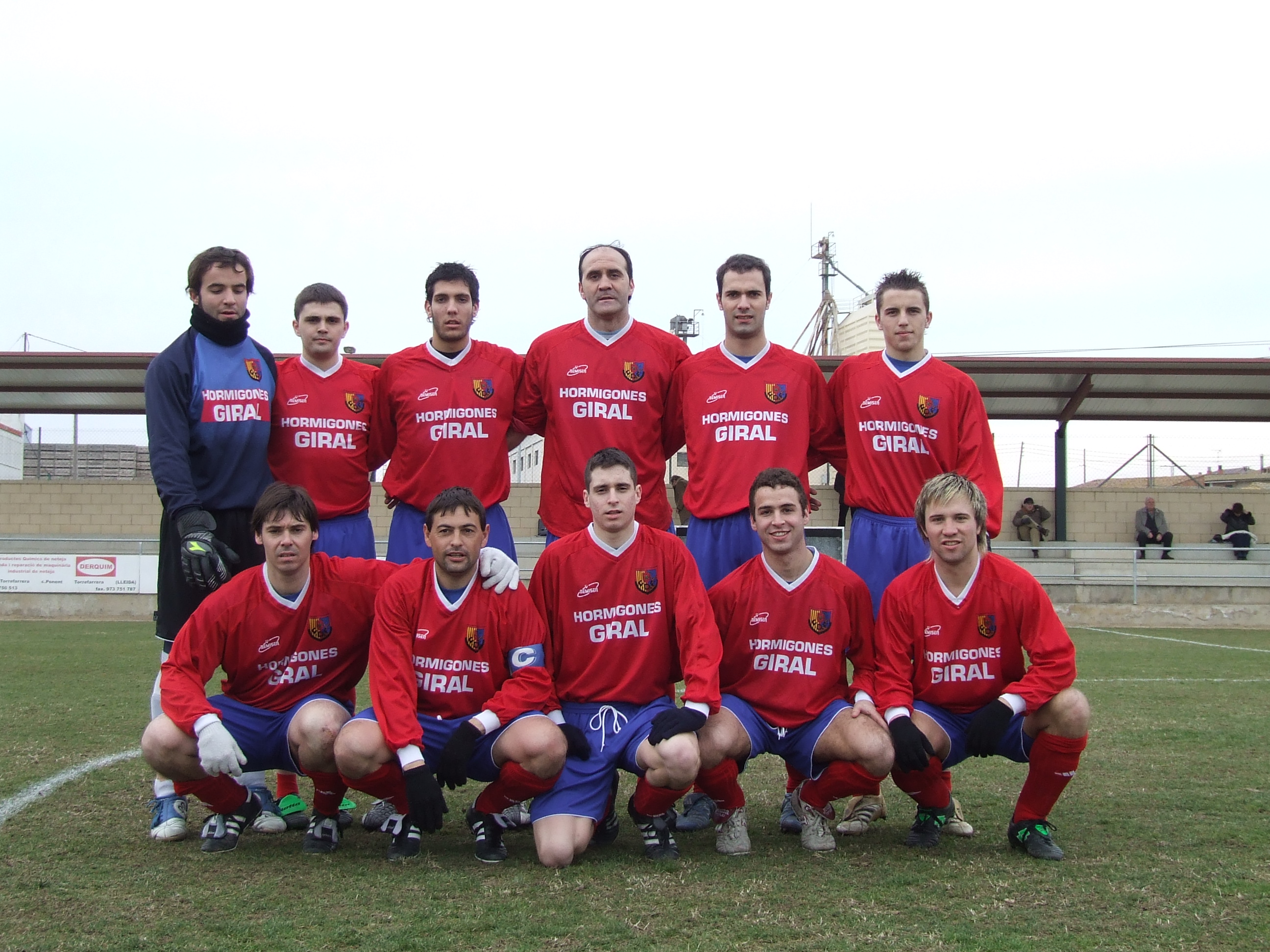 UD Fraga contra Reve Altorricón (28/01/2006)